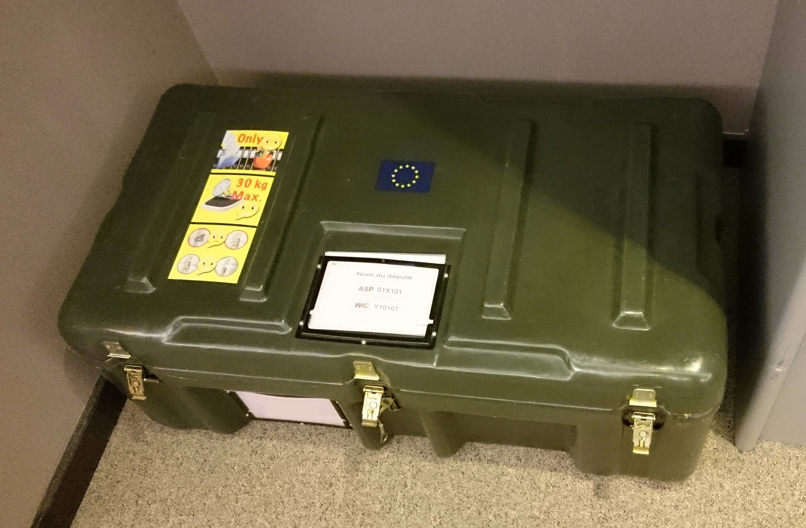 Malle permettant le transport des affaires des députés du Parlement européen de Bruxelles au Parlement de Strasbourg pour les sessions plénières. La malle indique le nom du député, l'adresse de son bureau au sein du Parlement de Bruxelles, puis l'adresse de son bureau dans le Parlement de Strasbourg.